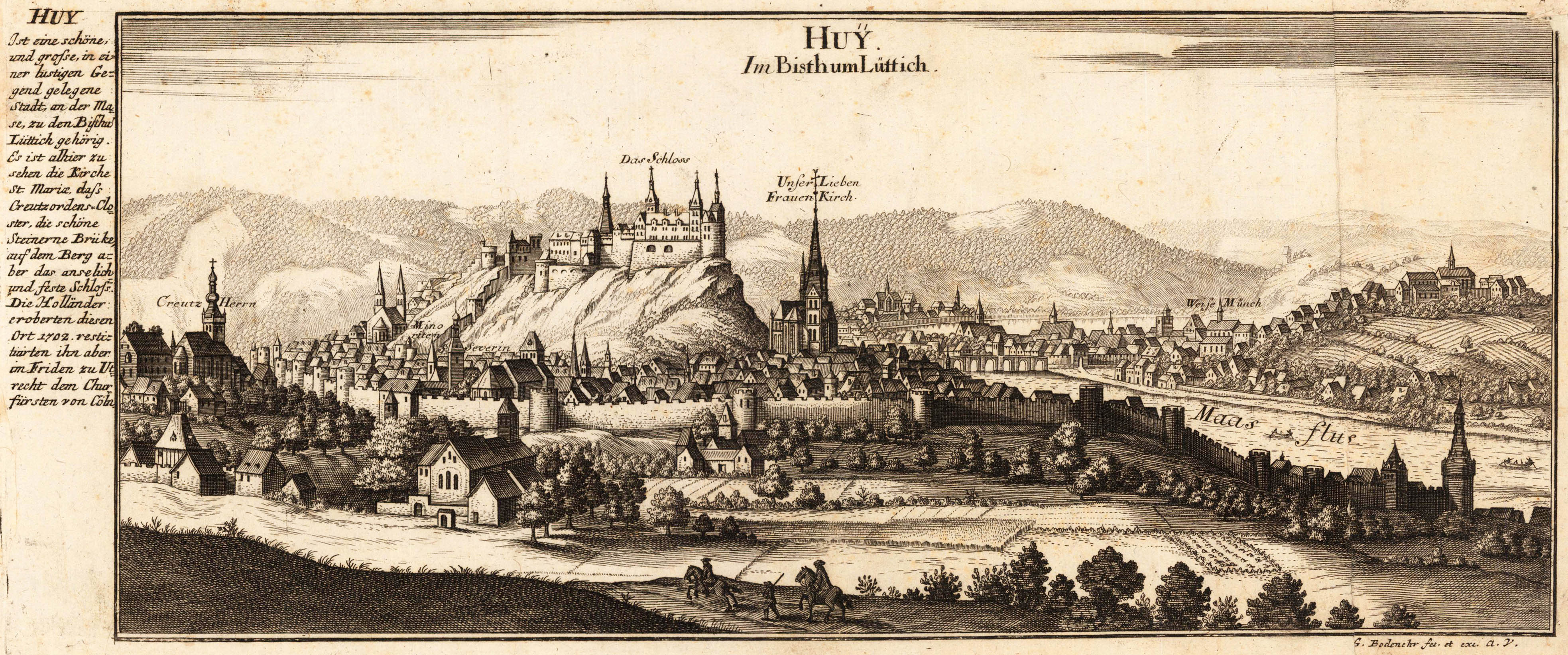 Vue de Huy (1725) par Gabriel Bodenehr